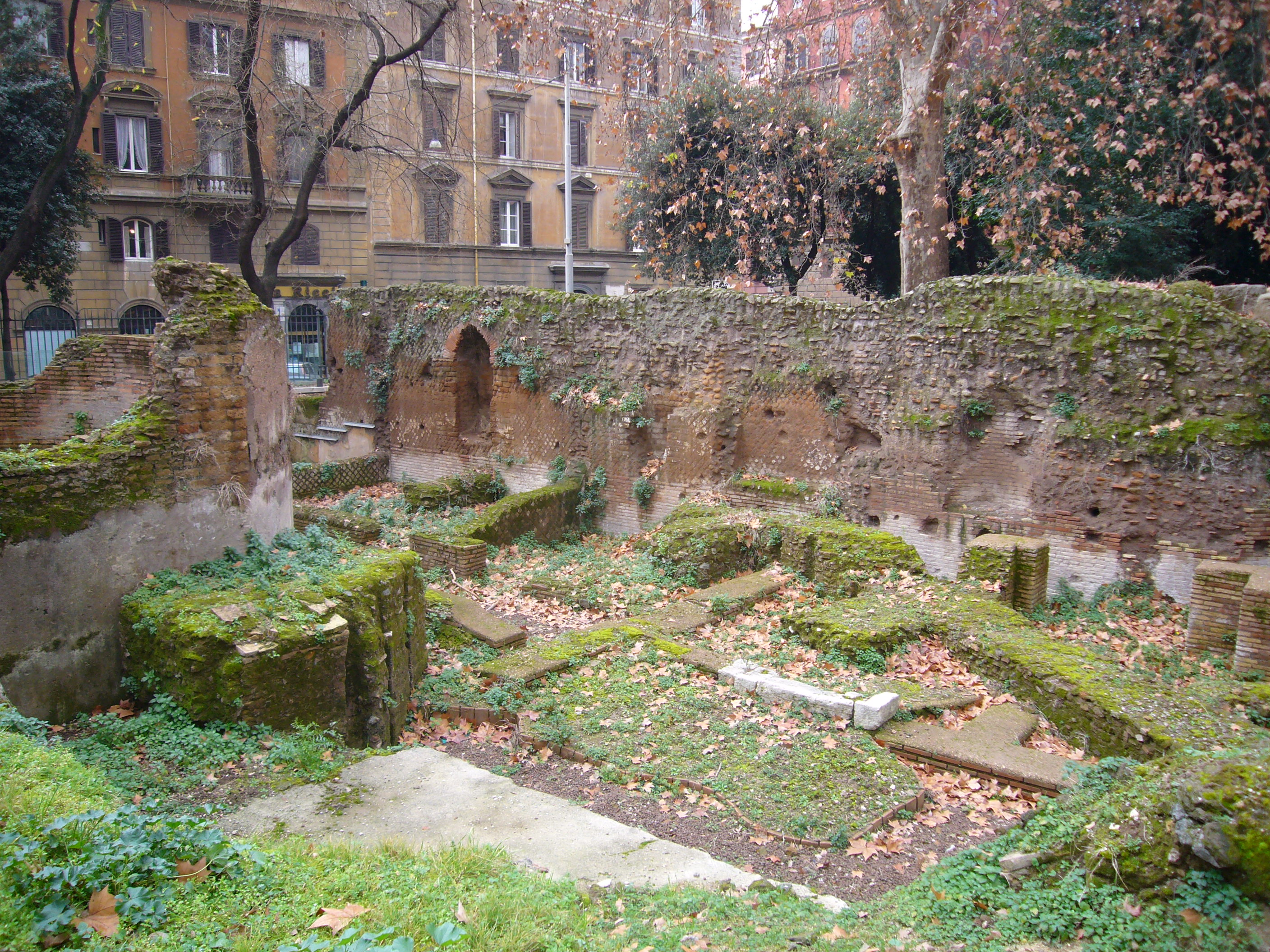 Roma, piazza Manfredo Fanti (rione Esquilino): resti di edifici di età imperiale e mura serviane all'Acquario (ora Casa dell'Architettura)